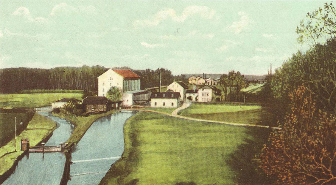 München, Tivoli-Kunstmühle am Eisbach